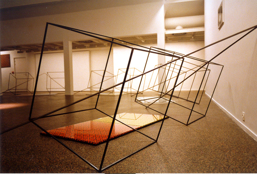 Artist :Gianfredo Camesi Title : «Lambda», exposition au Centre Culturel Suisse, Paris, France. 1988.